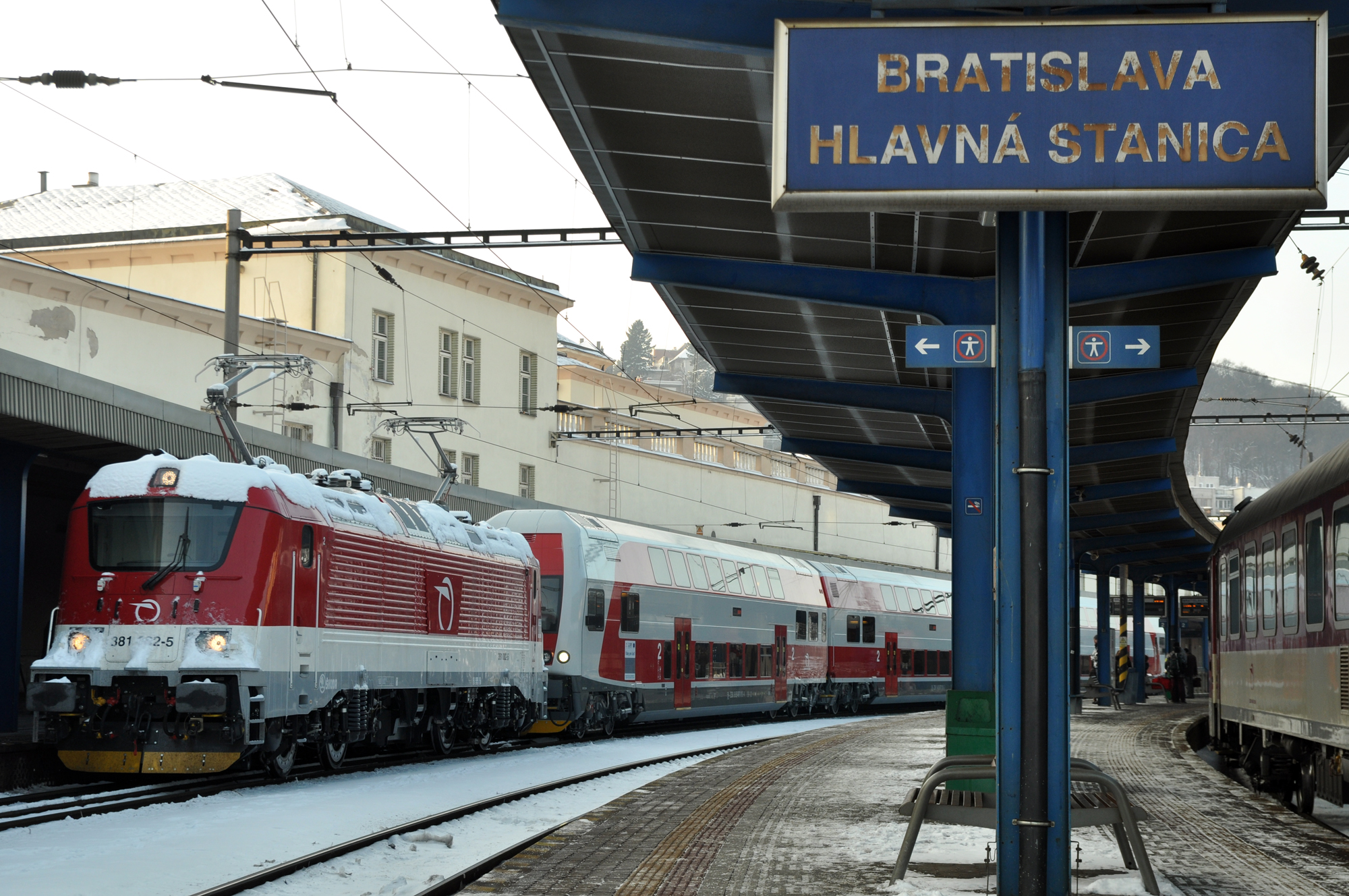 Slávnostné odovzdanie rušňa a EPJ